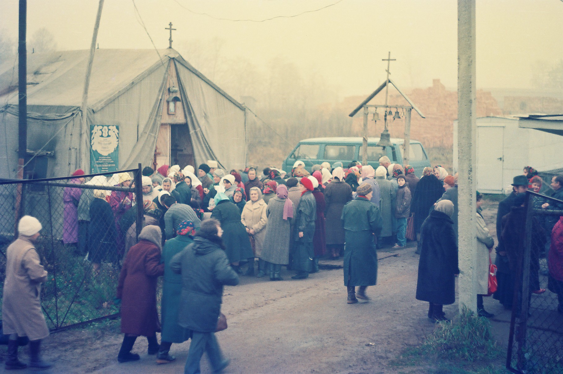 Прихожане у палатки, в которой проходили первые богослужения.